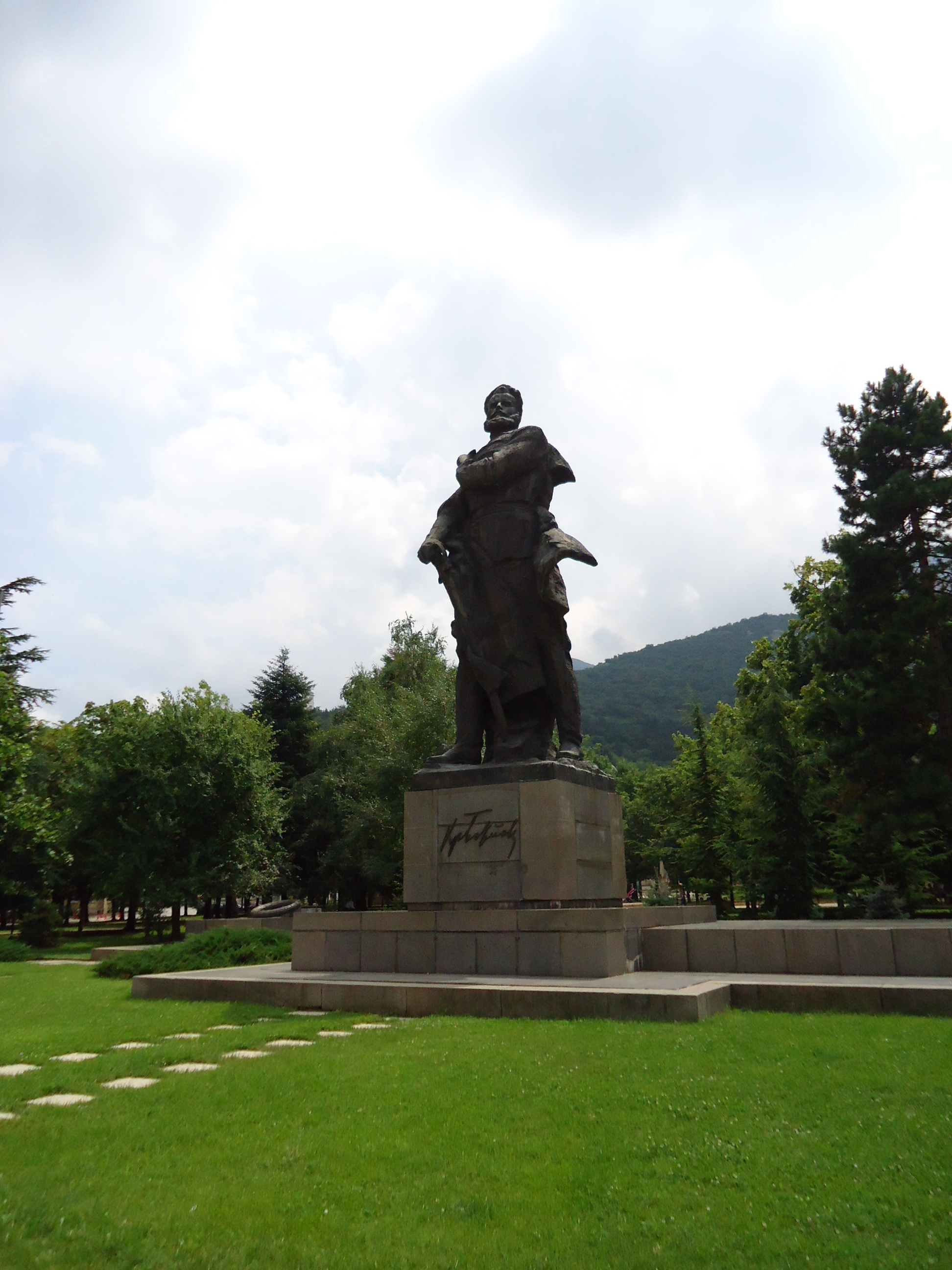 Паметник на Христо Ботев в центъра на град Враца, където на 1 юни всяка година се отбелязват Ботевите дни с тържествена митинг-заря.